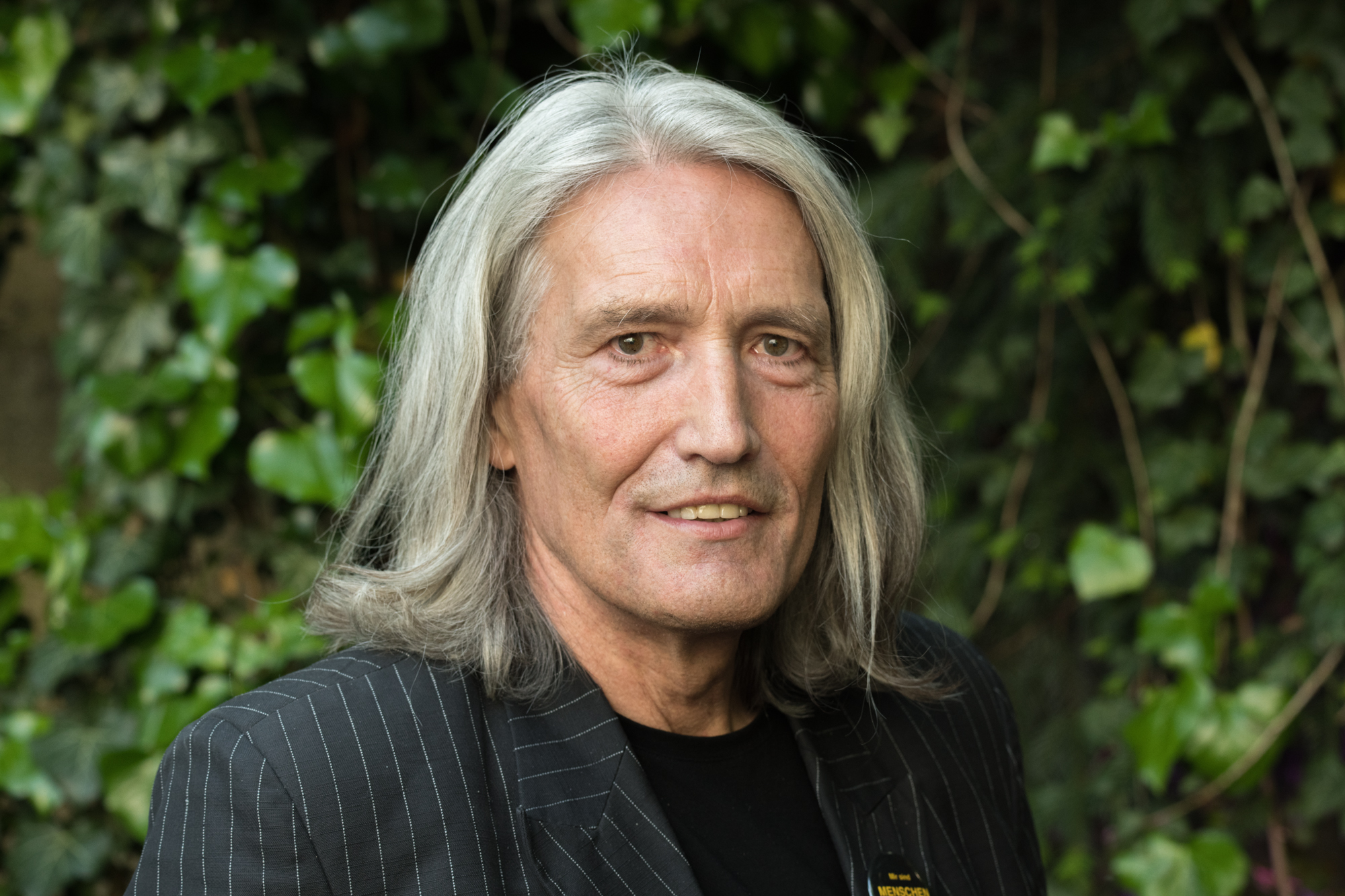 Andreas Gruber bei der Eröffnung des Flüchtlingswohnheimes 'Haus der Menschenrechte' von SOS Menschenrechte in Linz